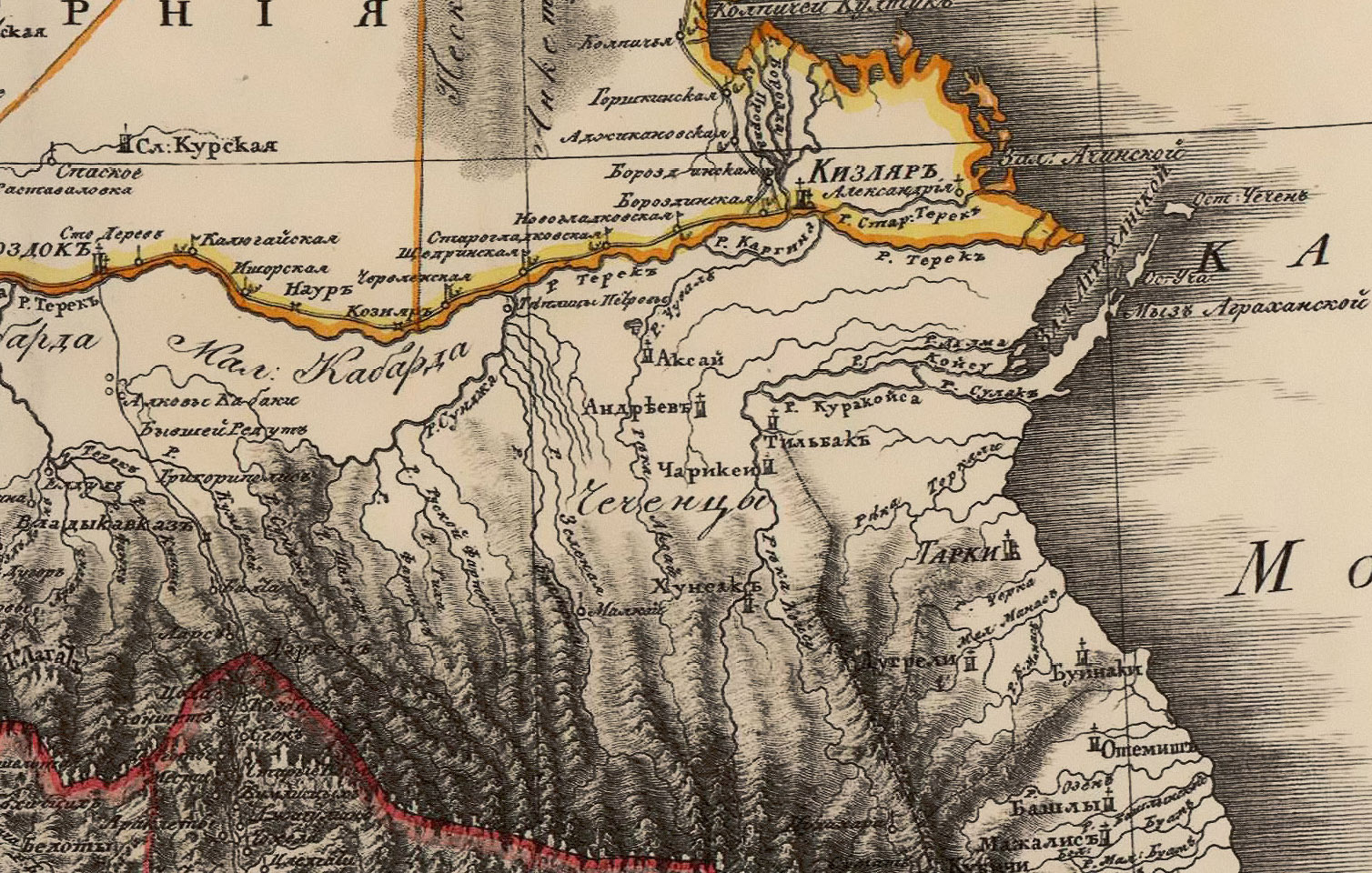 Карта Кавказа из атласа Российской Империи для гимназий (Восточная часть Кавказа)